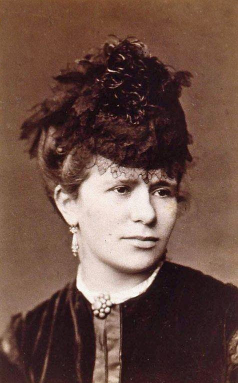 Marie Jaell (1846-1925), jeune femme, coiffée d'un élégant chapeau. Bibliothèque nationale et universitaire de Strasbourg